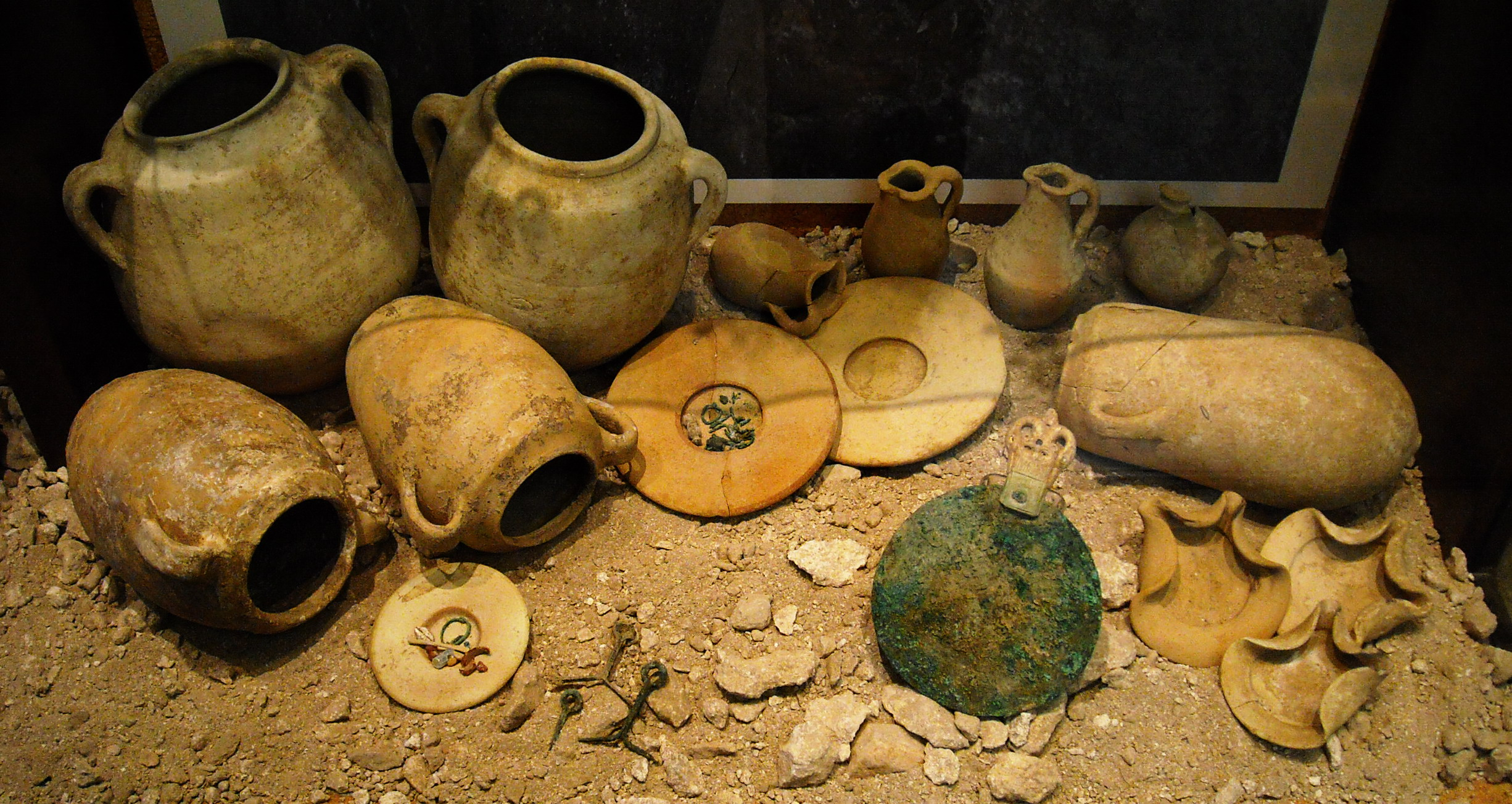 Corredo funebre dalla necropoli di Tuvixeddu , Cagliari